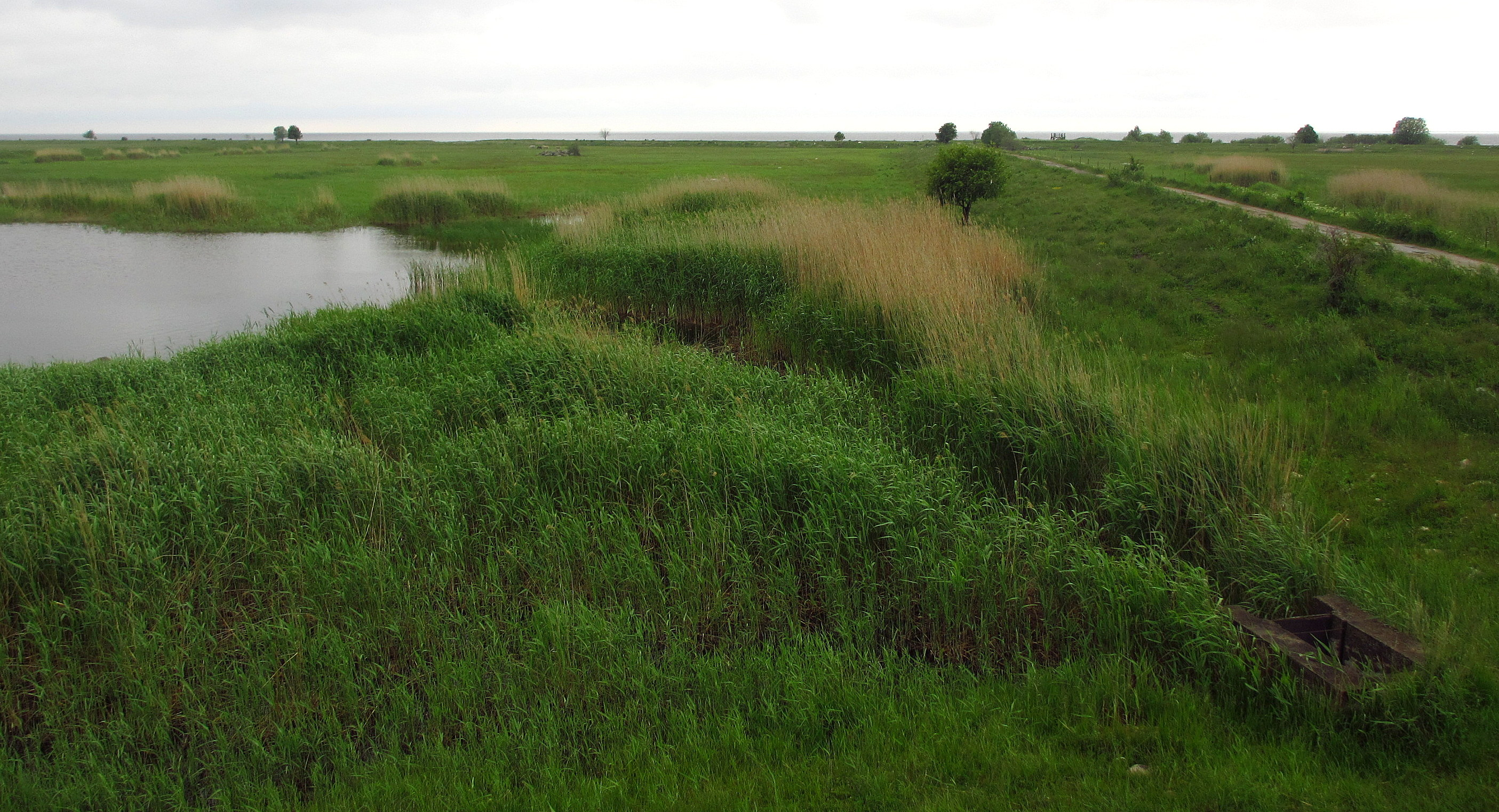 Pikla rannaniit Luitemaa LKAl, vaade tornist